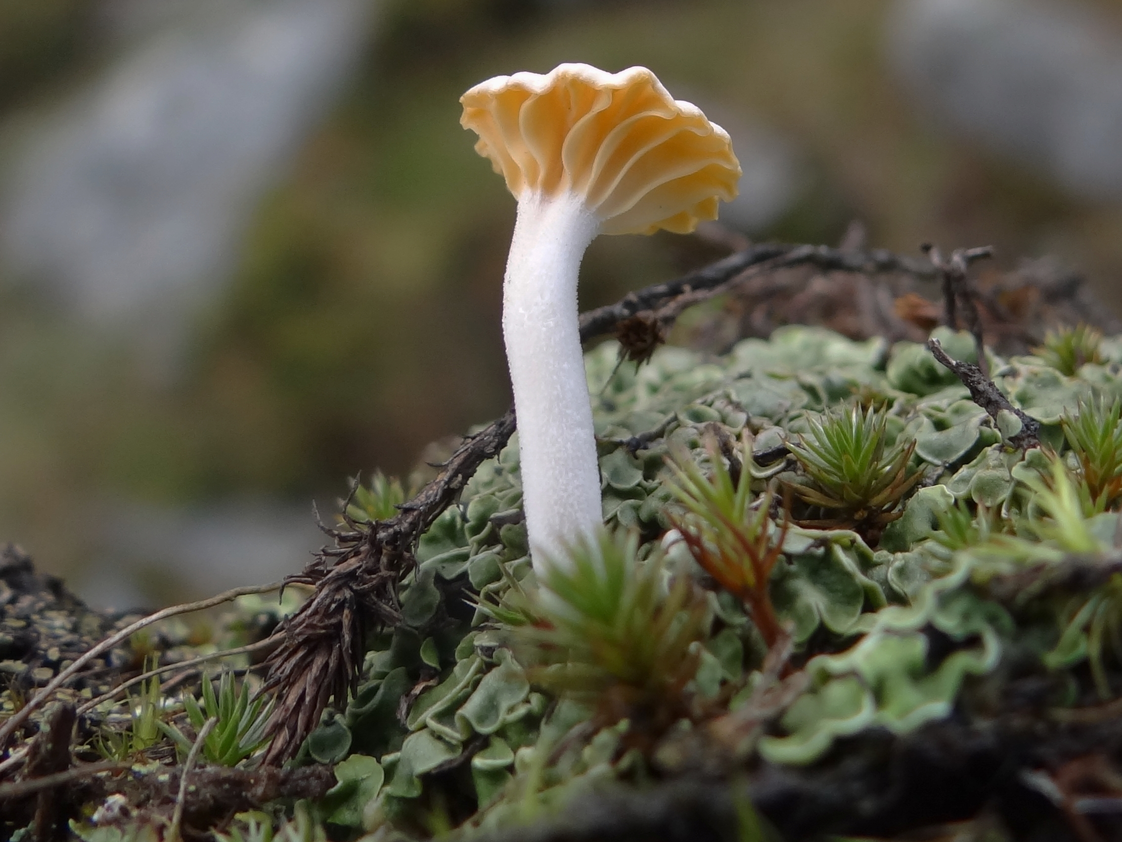 Lichenomphalia umbellifera (location:Poland, Beskid Zywiecki, Babia Góra, Diablak)